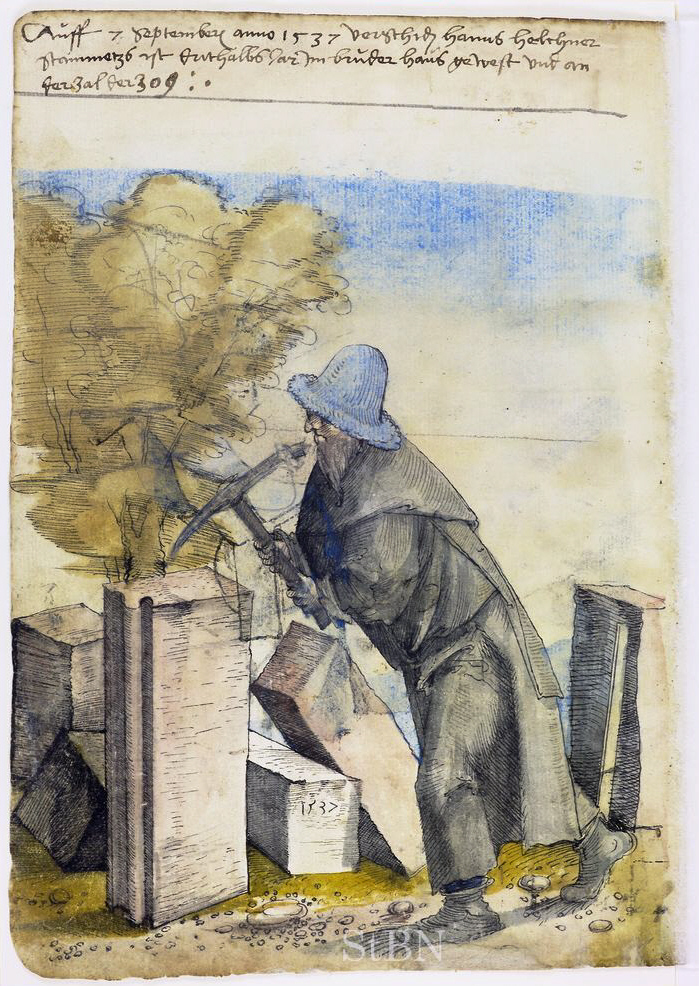 hanns (Hans) helchner (Helchner) , stainmetzs (Steinmetz) Transkription und weitere Informationen